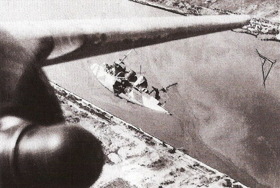 Il relitto dell'incrociatore leggero Bari affondato nel canale industriale di Livorno.